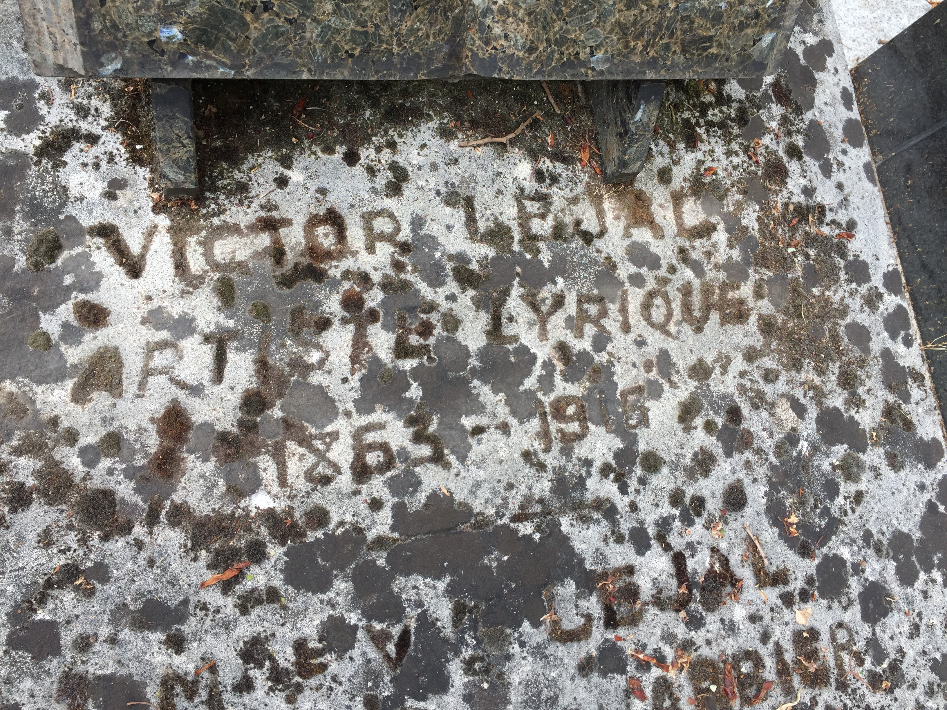 Sépulture de Victor Lejal au cimetière parisien de Saint-Ouen (détail)